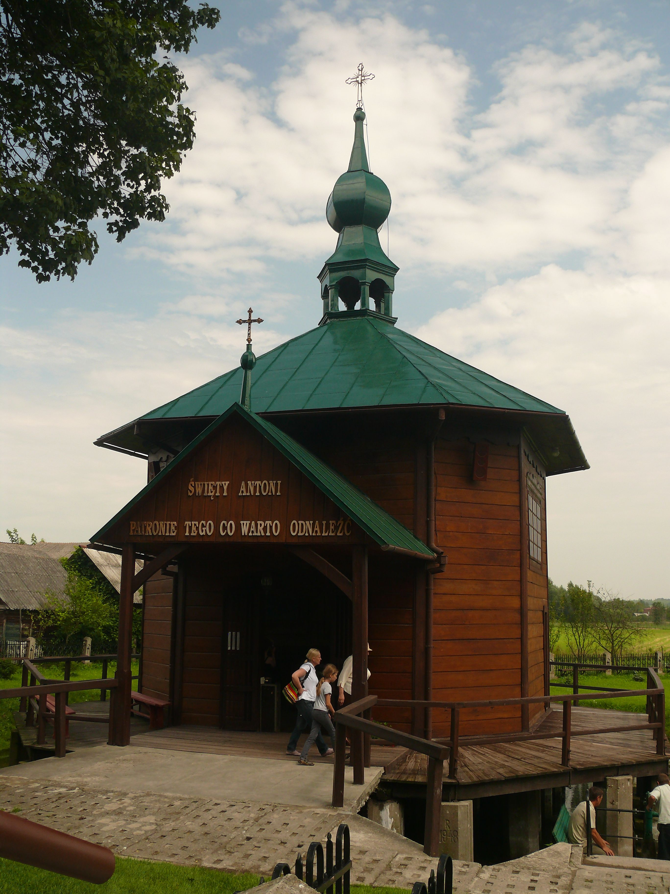 Radecznica - kaplica św. Antoniego, patrona rzeczy zagubionych